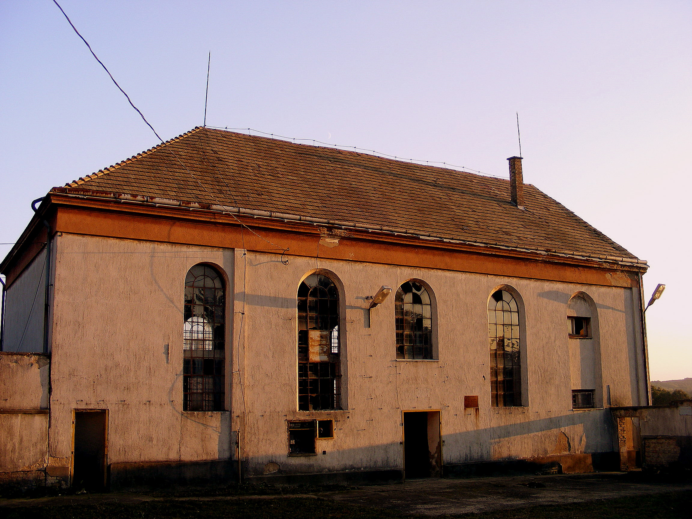 Zsinagóga (Dombóvár, Deák Ferenc utca 12.) This is a photo of a monument in Hungary, Identifier: 12267